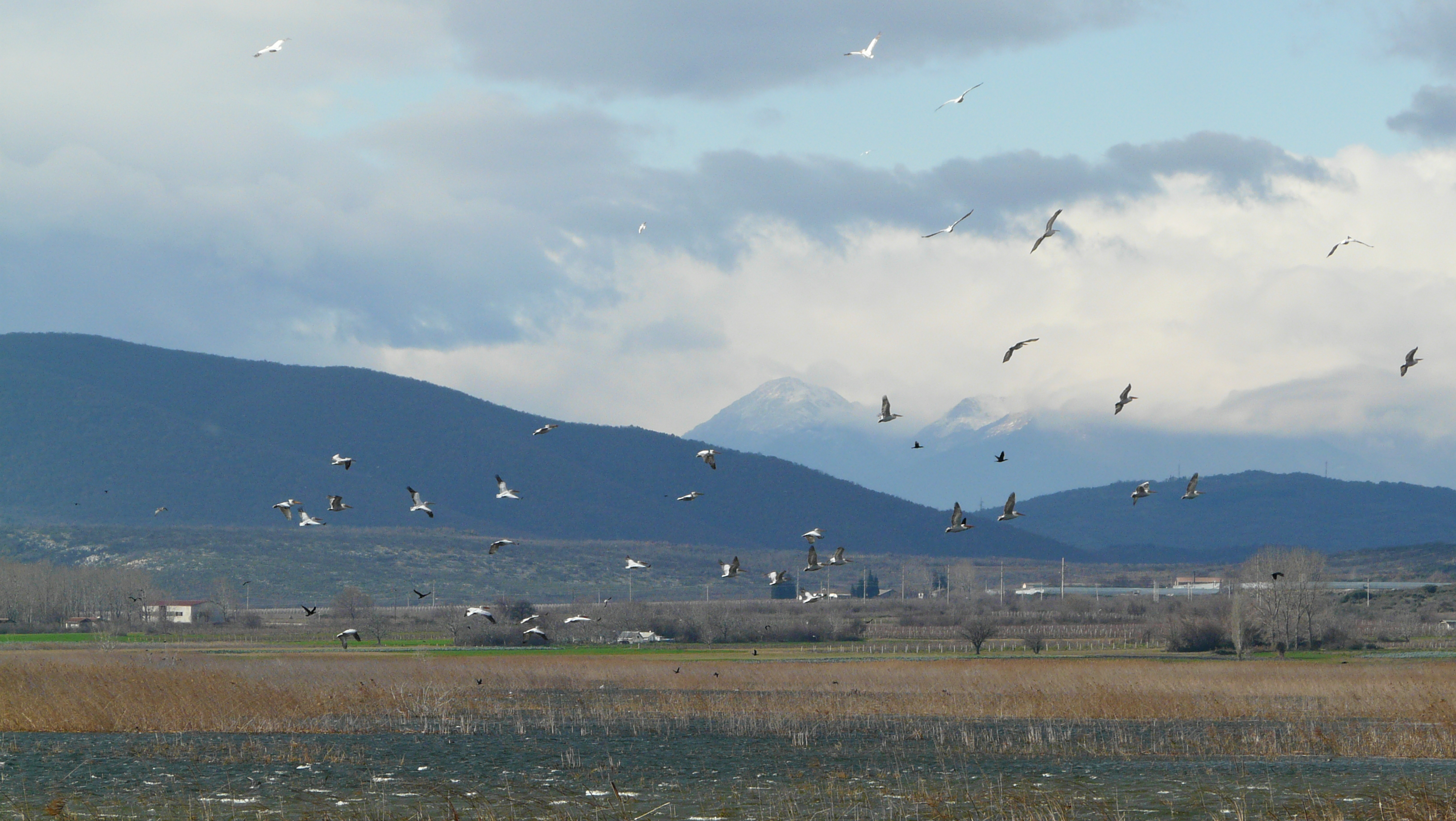 Lake Dojran, Macedonia